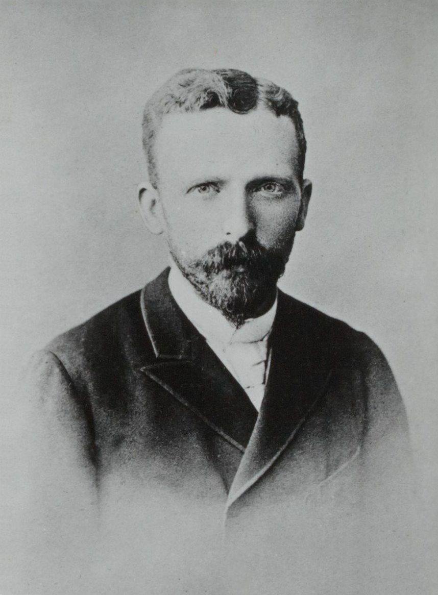 Theo van Gogh Collectie Nationaal Archief Vervaardiger RVD Fotonummer 133_1391